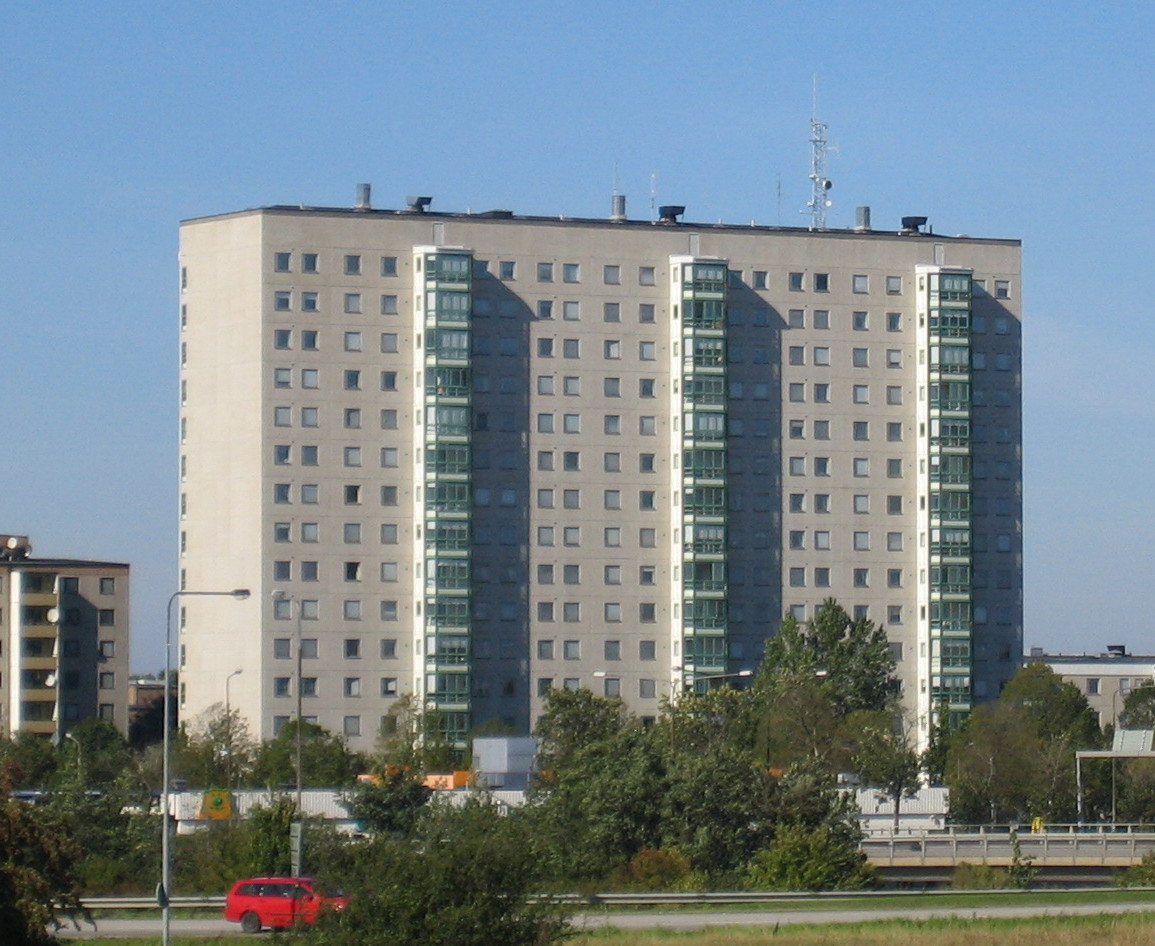 Kryddgården, Malmö, Sweden